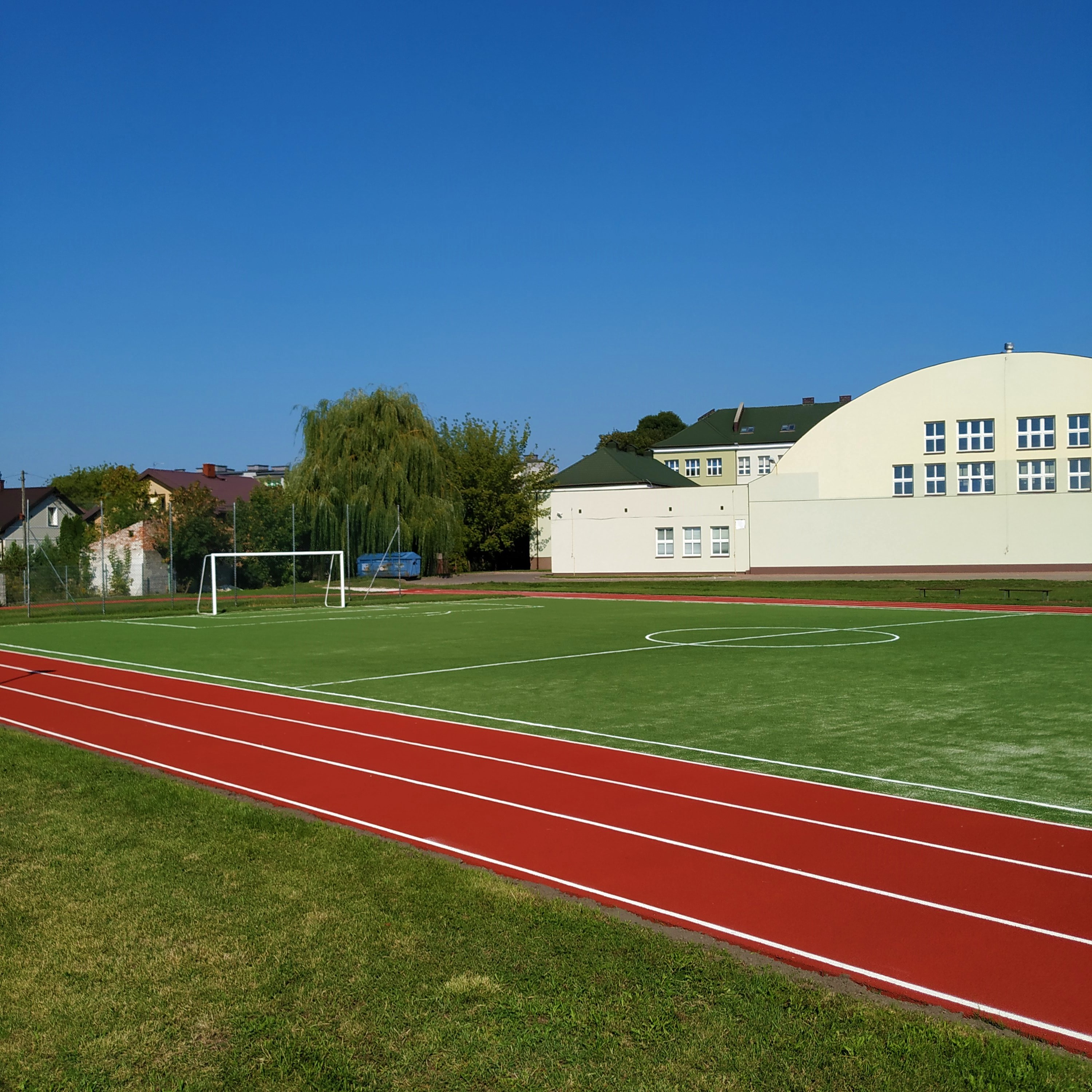 Boisko Zespołu Szkolno-Przedszkolnego nr 1 w Łukowie